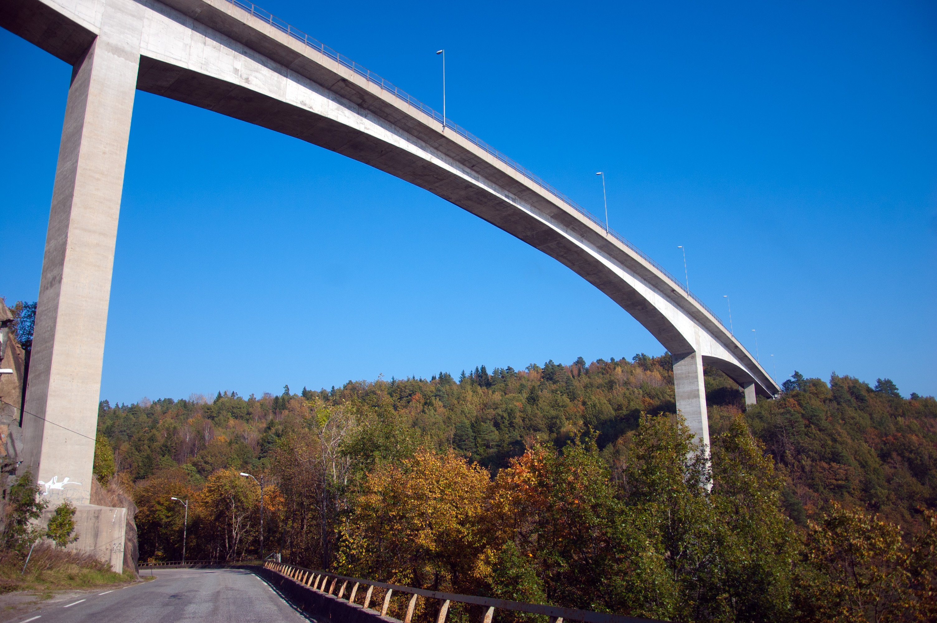 Vestre Langangen bru på E18 i Telemark.